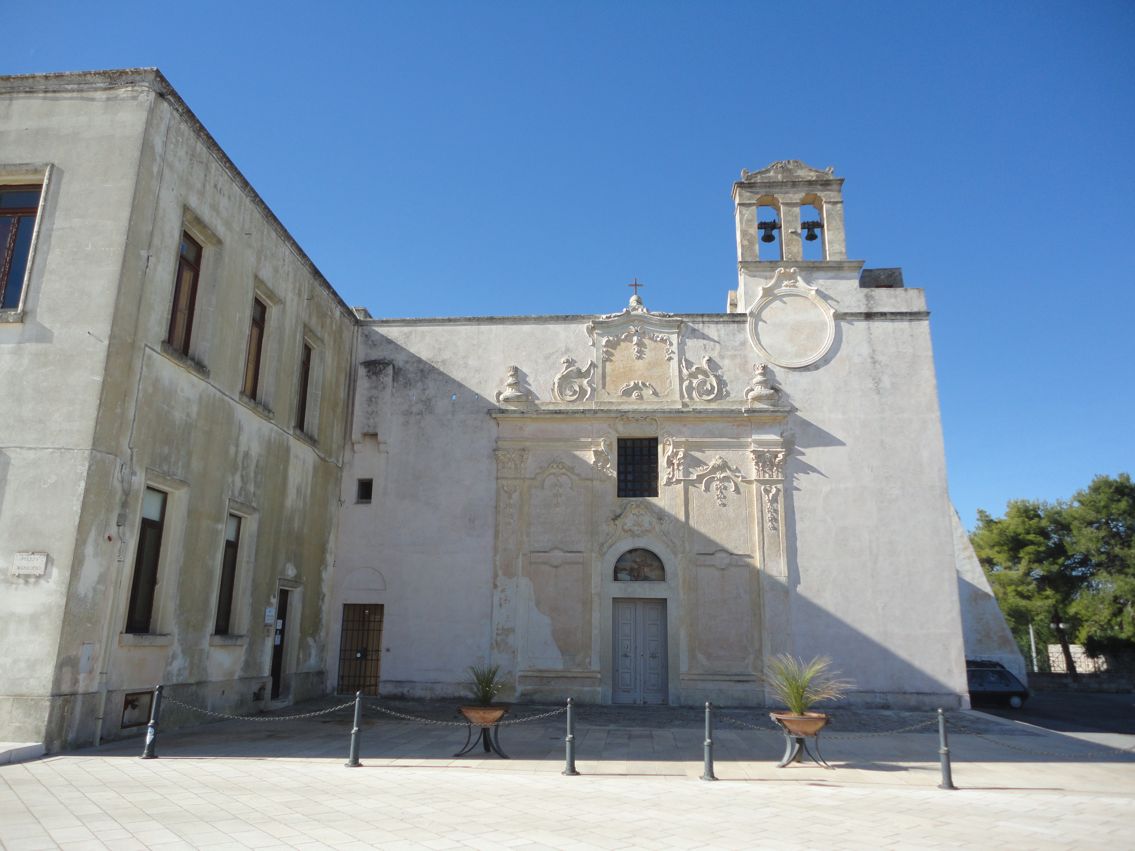 Chiesa di San Francesco d'Assisi Diso, Lecce